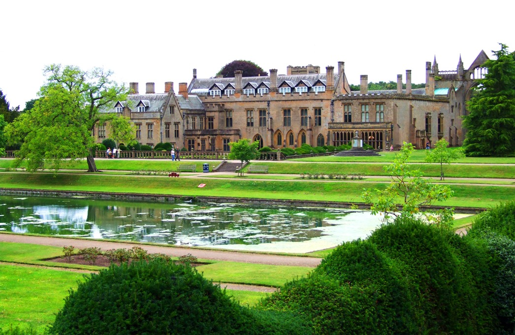 Blick über den Eagle Pond zum Herrenhaus von Newstead Abbey